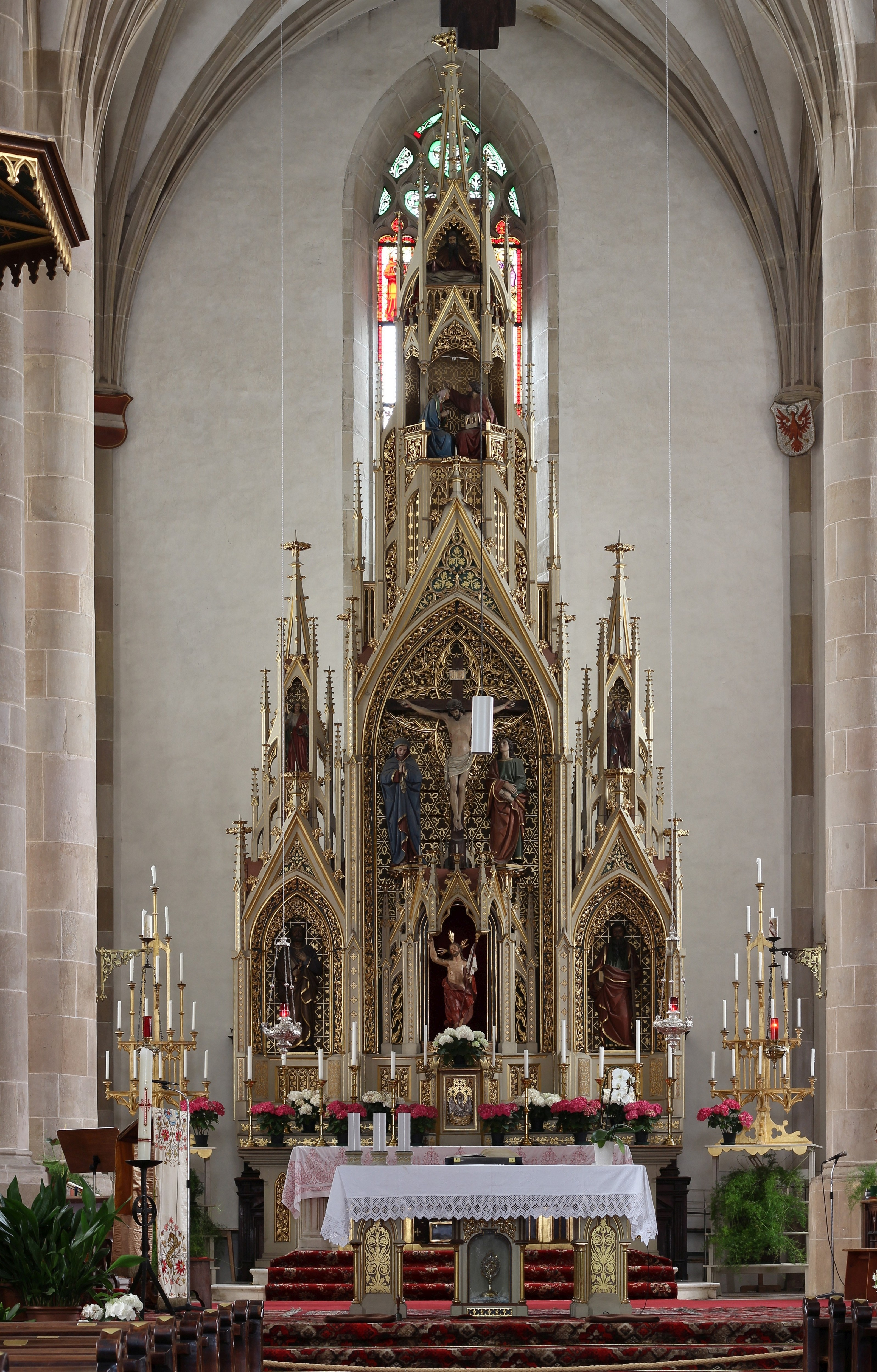 Hochaltar von Michael Stolz in der Pfarrkirche St. Pauls in Südtirol